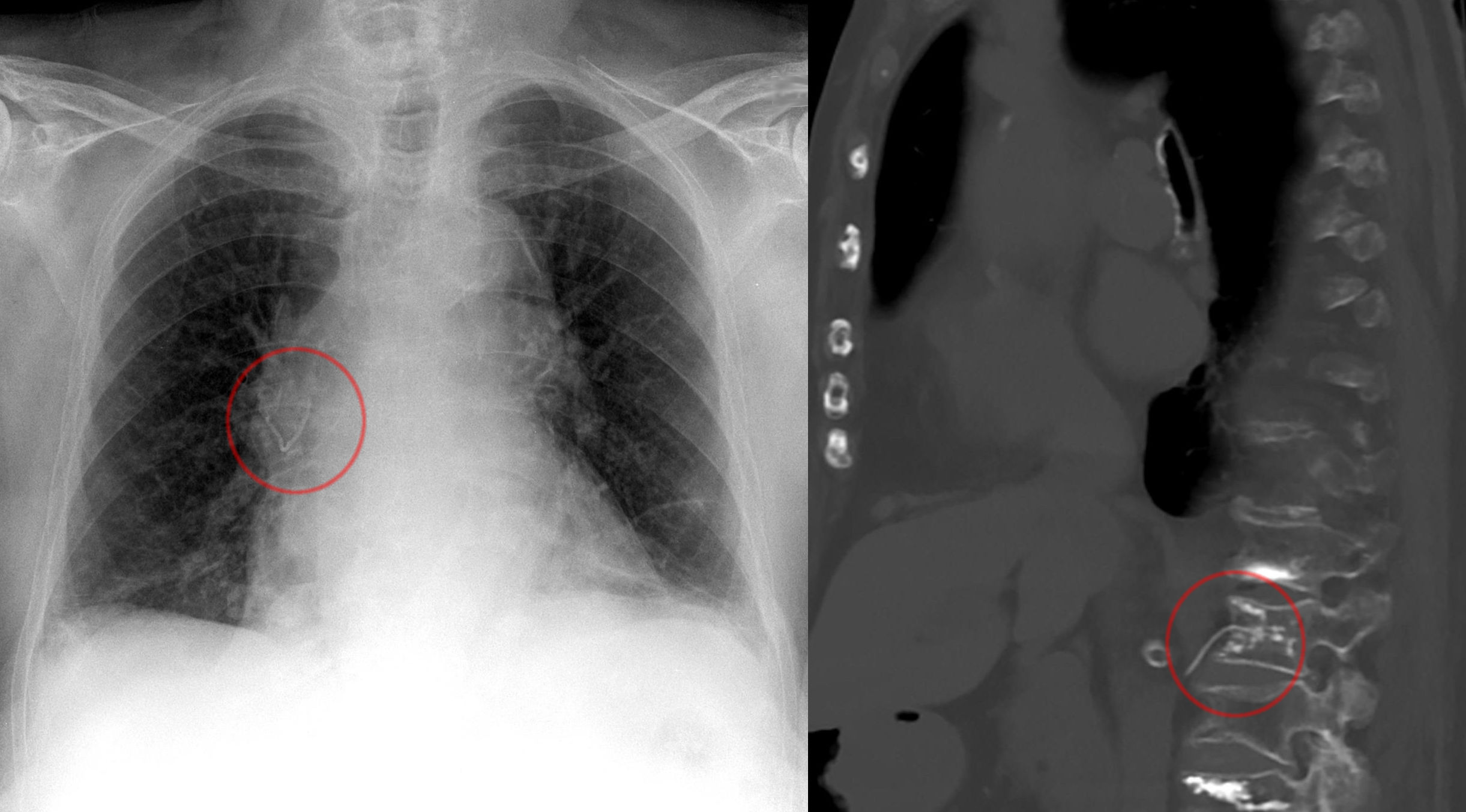 Pulmonale Zementembolie bei einer 92-jährigen als Zufallsbefund einige Zeit nach Kyphoplastie. Symptome waren nicht zuzuordnen. Thoraxröntgenbild mit dünner, röntgendichter Struktur auf den rechten Hilus projiziert und Computertomographie sagittal rekonstruiert, die den Austritt aus dem Wirbel in eine Vene zeigt.